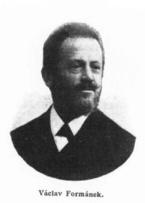 Václav Formánek (1845-1919), český politik